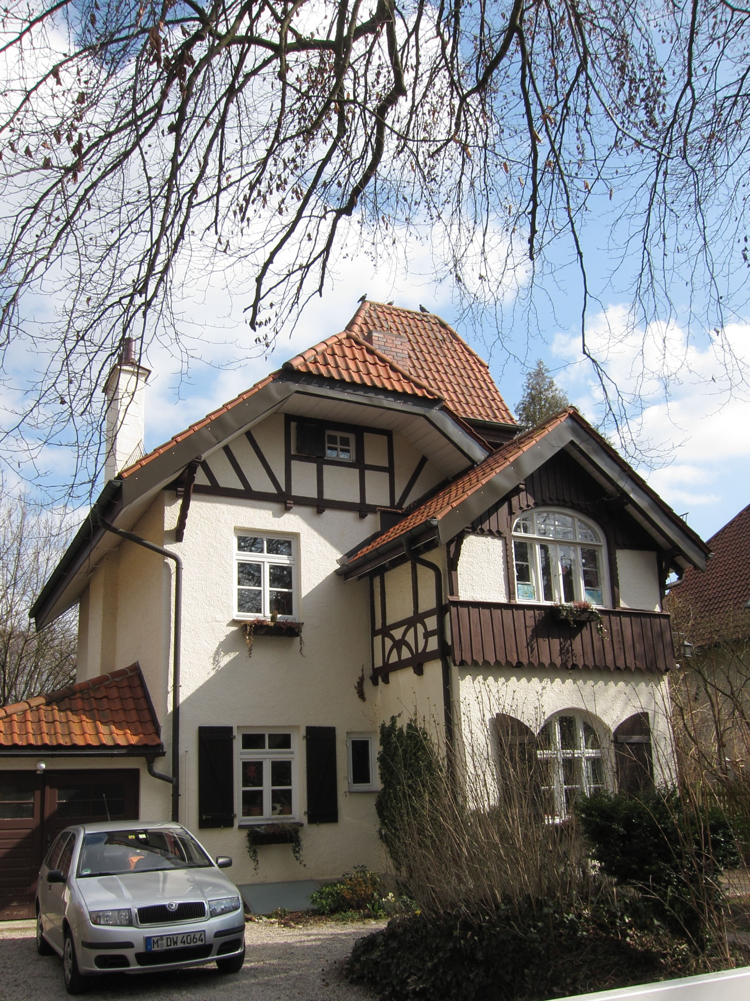 Fritz-Reuter-Straße 22; Malerische Villa, Landhausstil, um 1895, aus dem Büro August Exter.